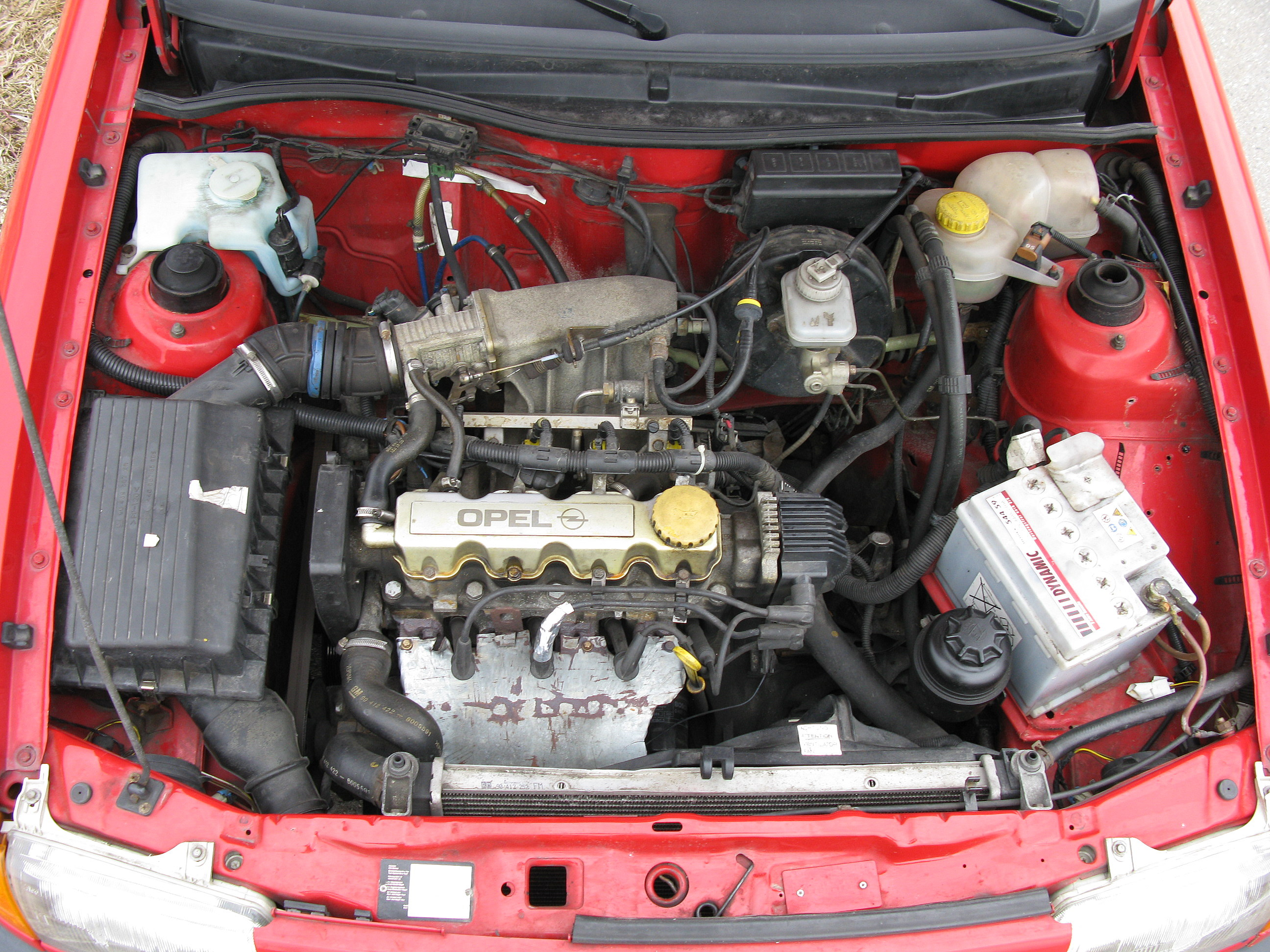 Frontscheinwerfer Opel Astra F CC BJ1994 Ottomotor 1,6Si 74 kW (101 PS) / 5800